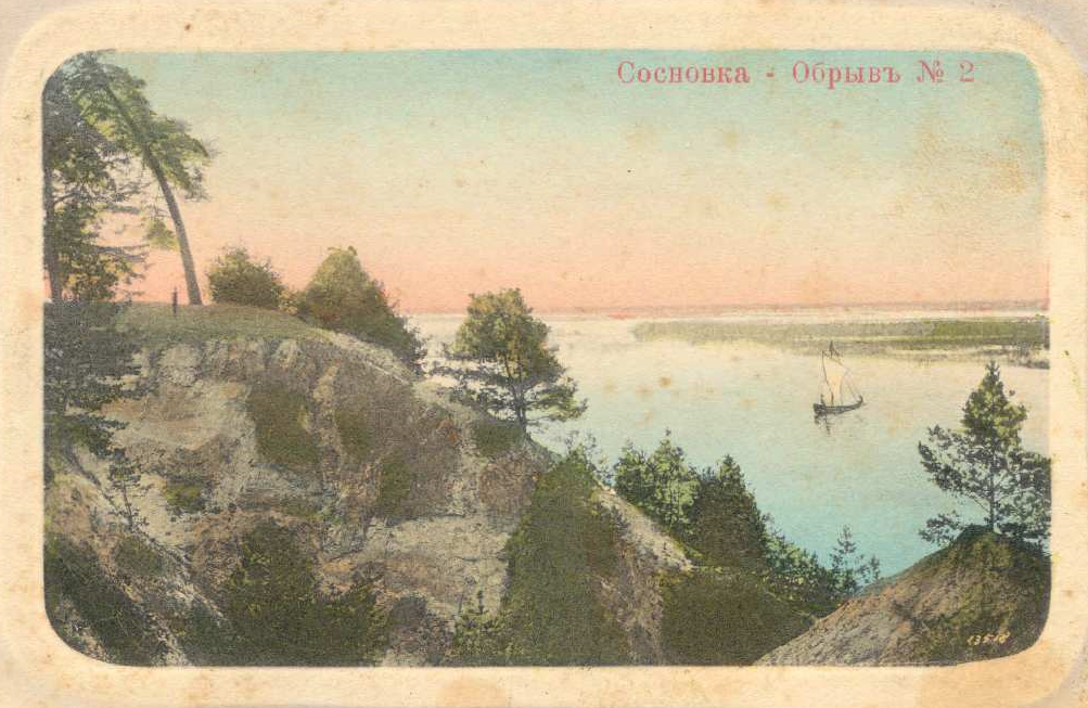 Соснівка: Фото-листівка